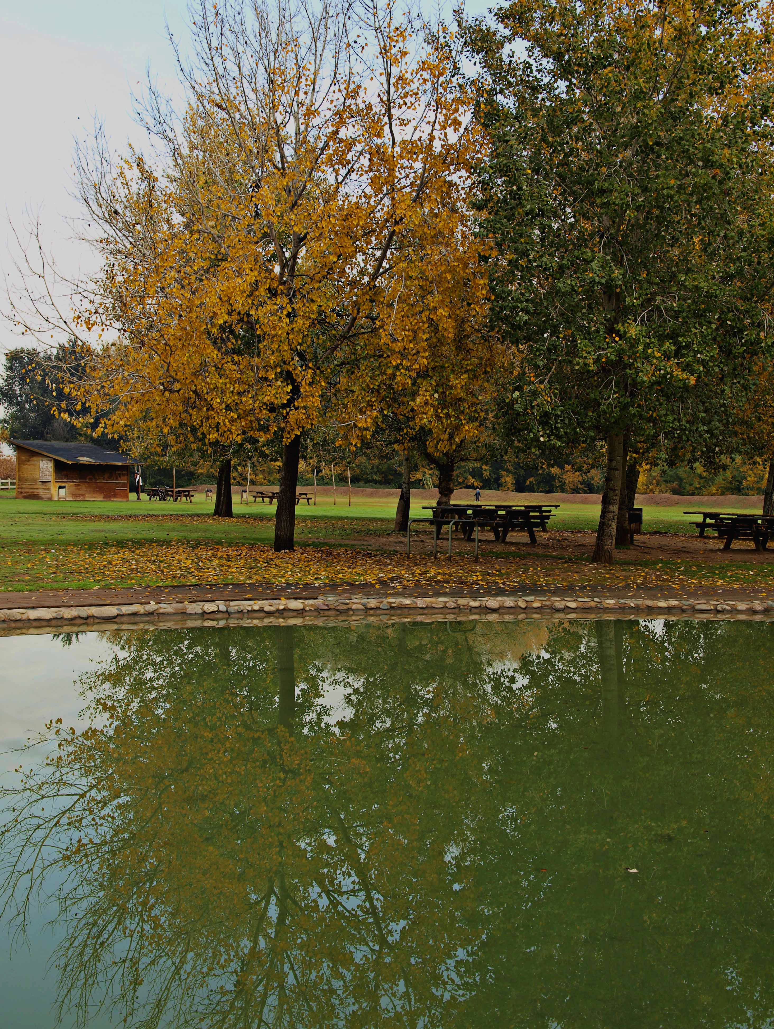 La Mitjana (Lleida)